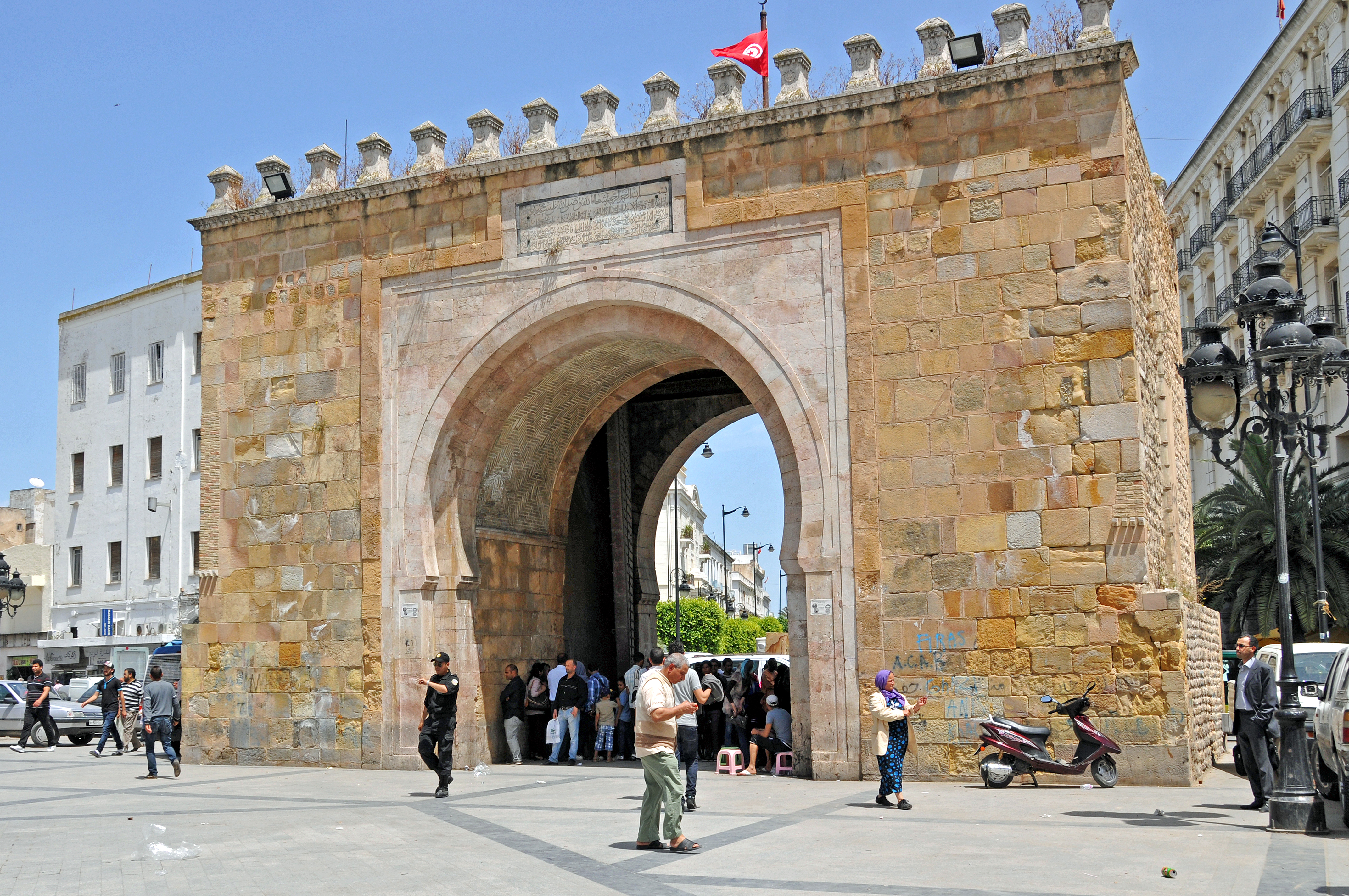 Vue de Bab El Bhar qui est l'une des portes de la médina de Tunis, en Tunisie. Elle marque la séparation entre la médina et la ville européenne.